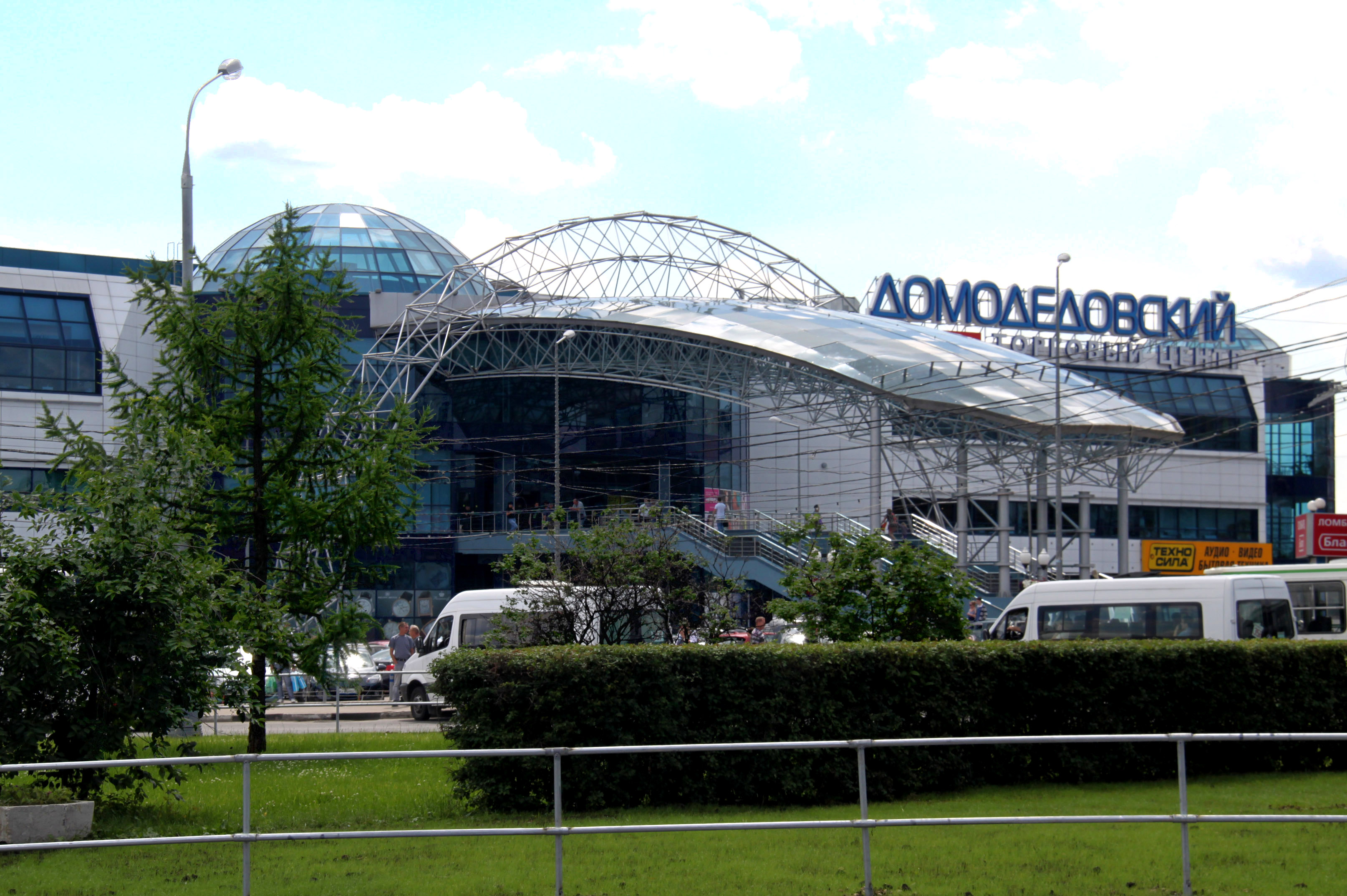 Торгово-развлекательный центр Домодедовский